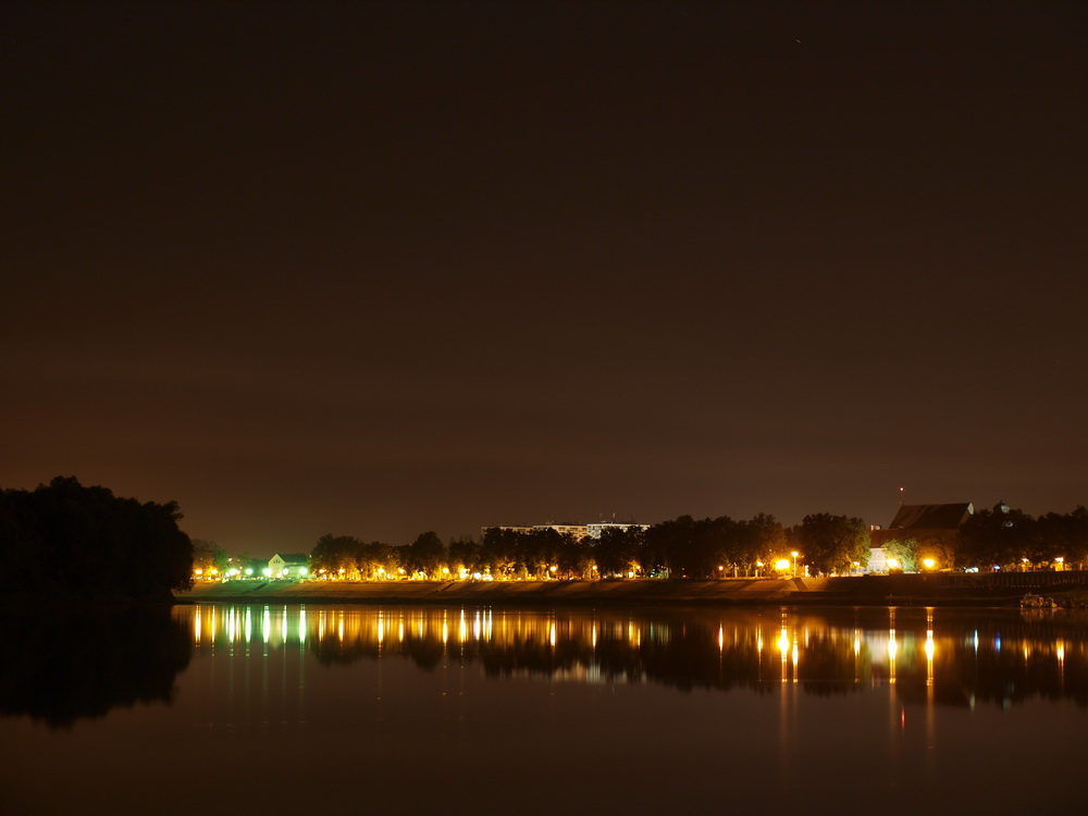 Slavonski Brod, noću.